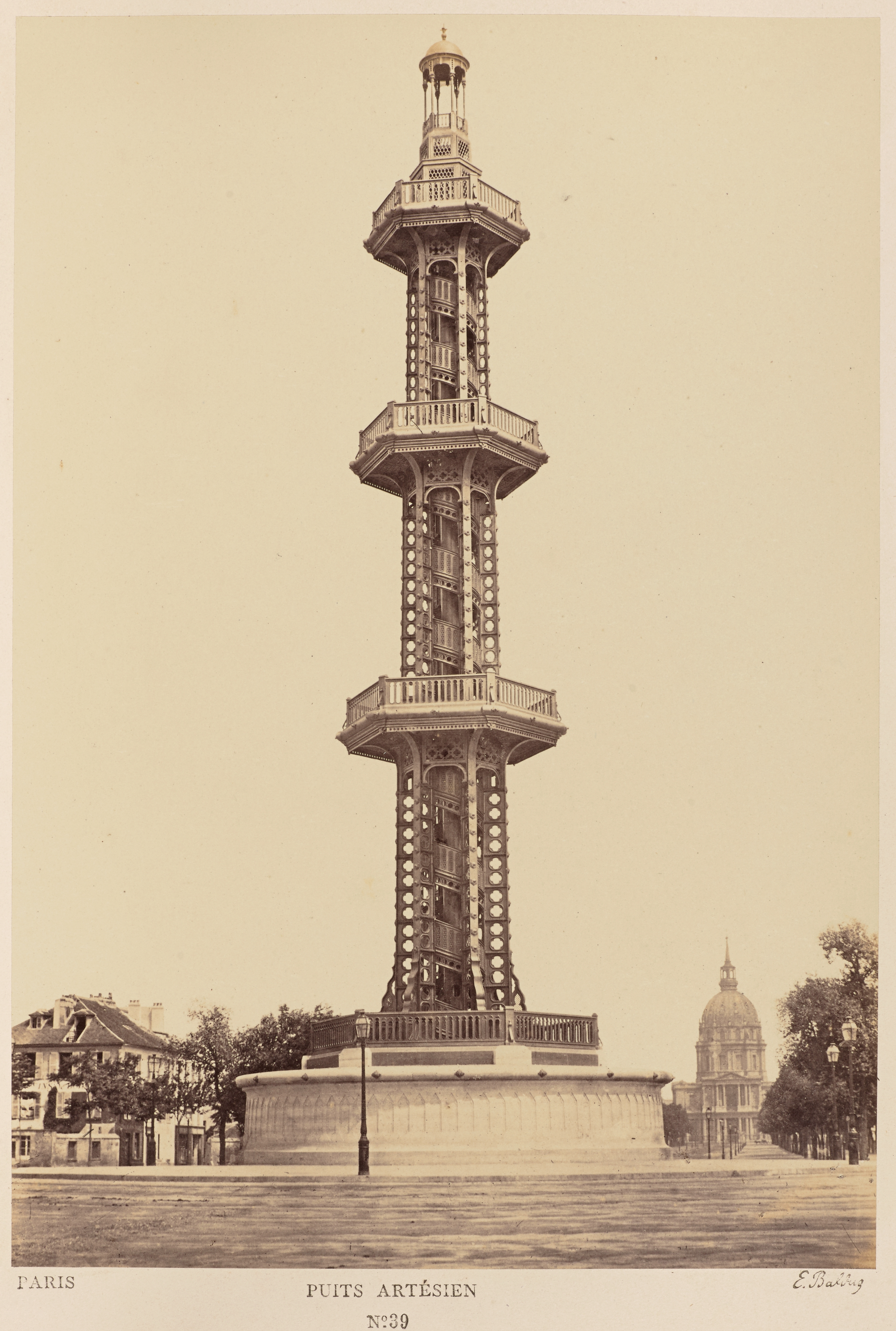 Puits Artésien, Paris. Albumine paper, 295 x 185 mn.